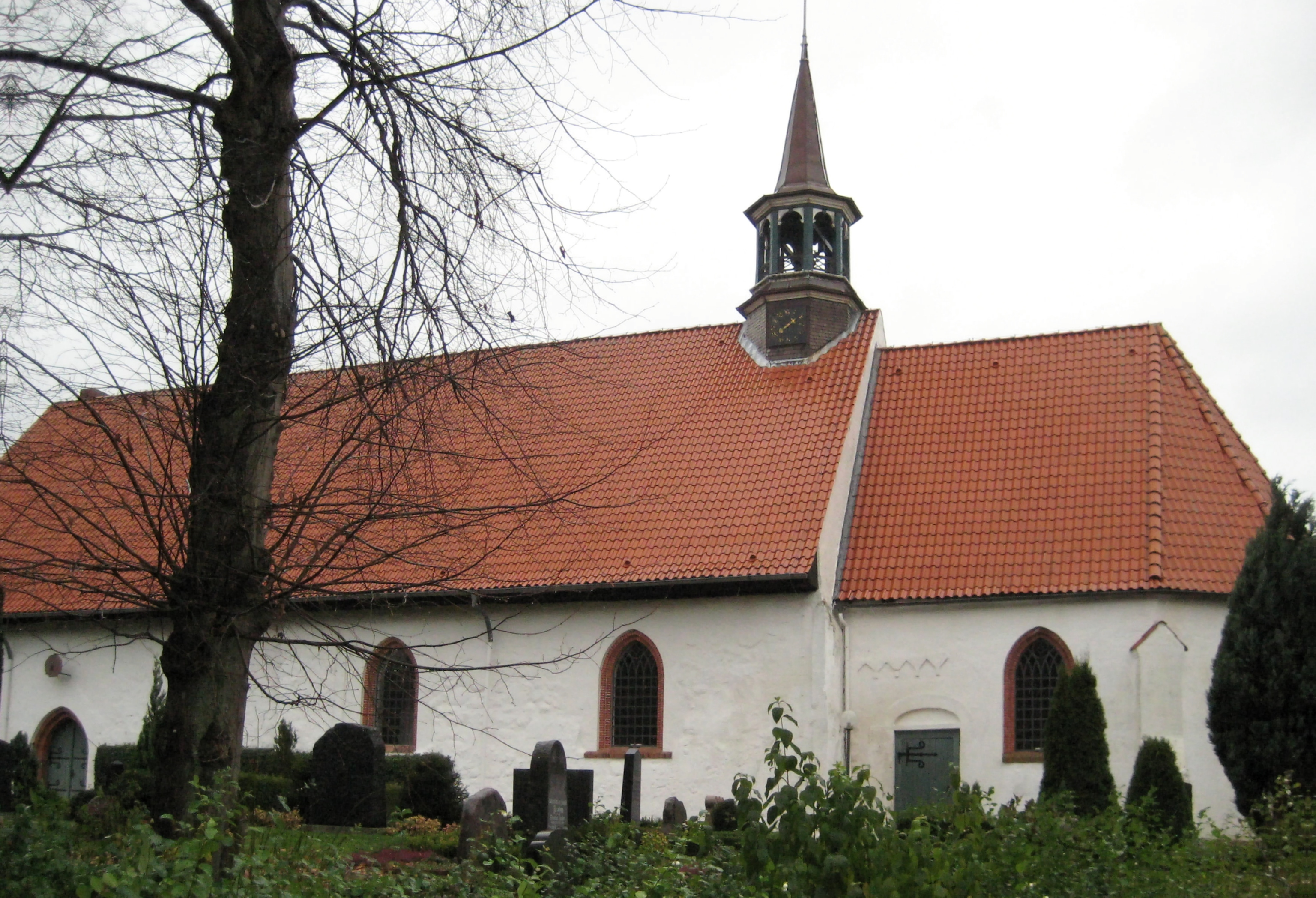 St. Leonhard-Kirche in Koldenbüttel in Schleswig-Holstein, Deutschland